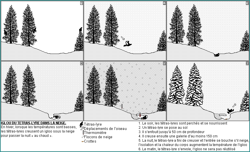 Schémas d'un gîte nocture du tétras-lyre en hiver